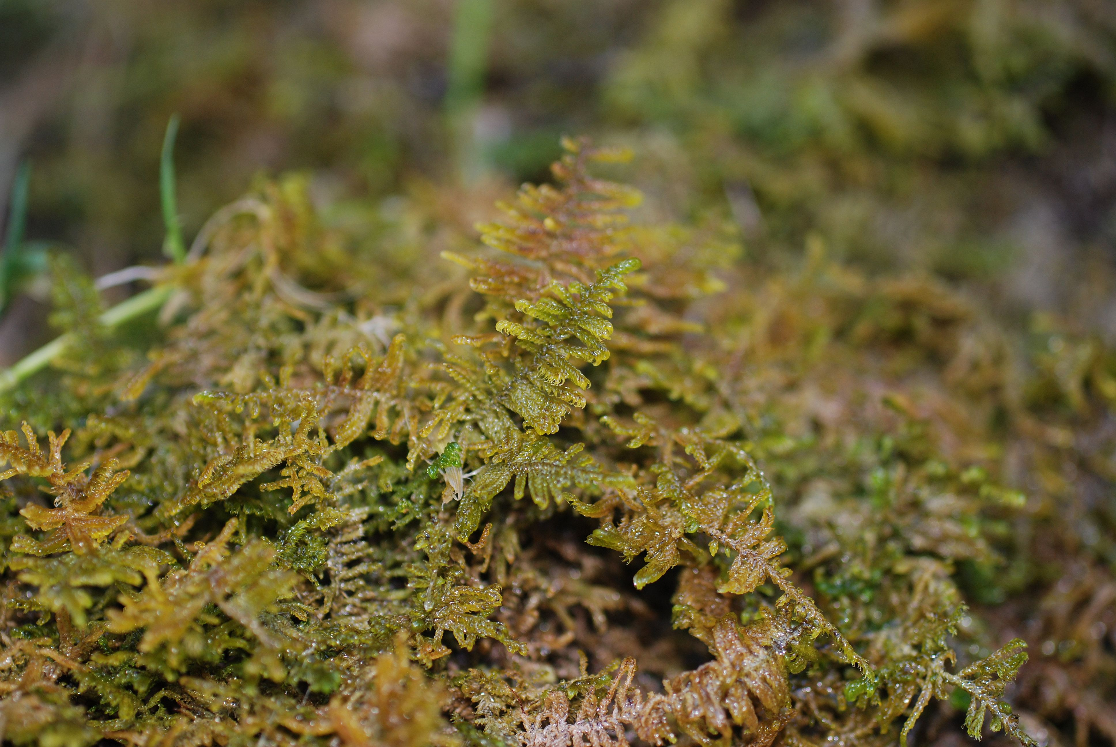 Cratoneuron filicinum, Rinnende Mauer, Upper Austria, Austria